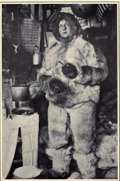 Рудольф Франке - спутник Фредерика Кука